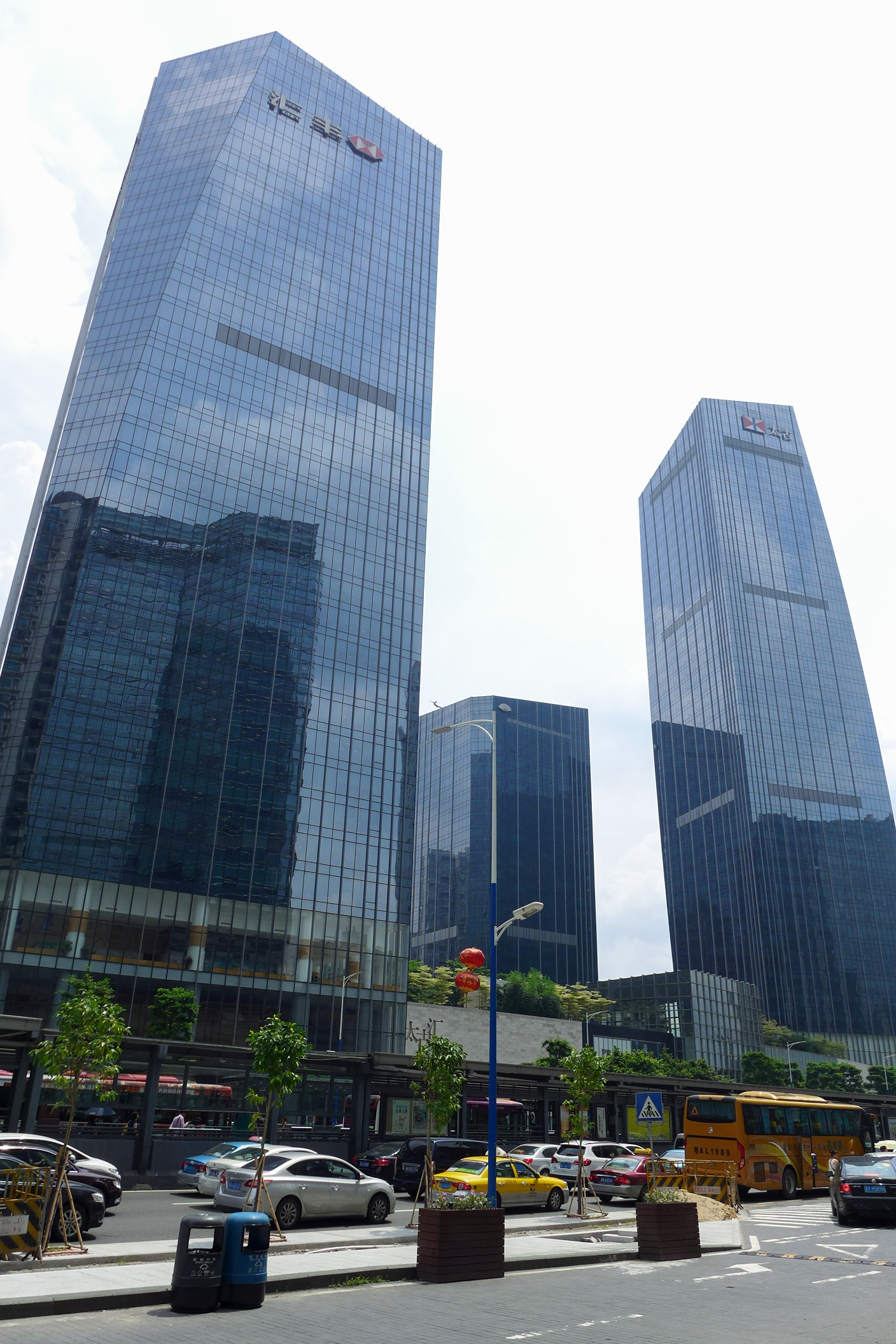 Taikoo Hui